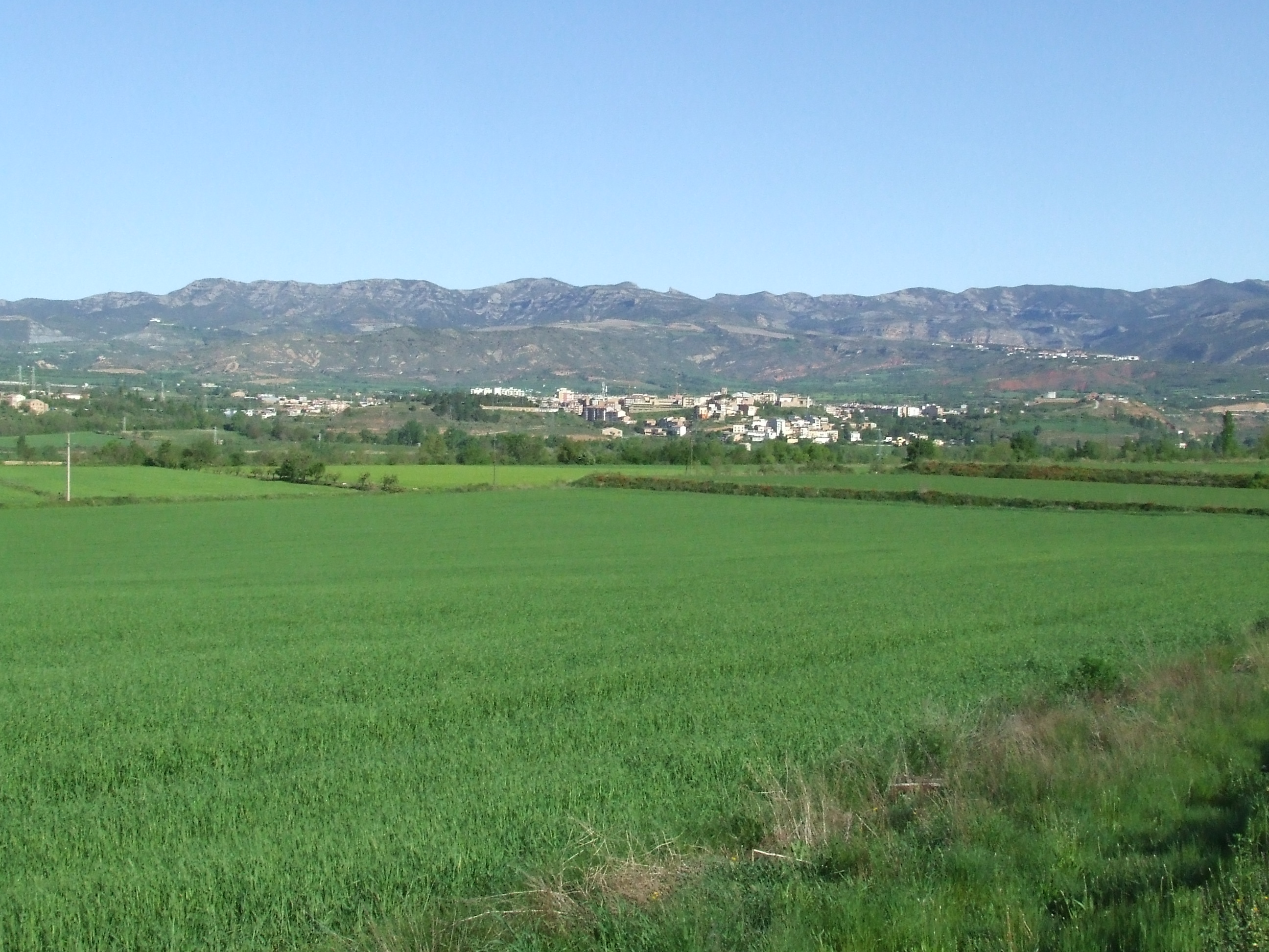 Tremp i la Conca Deçà (Tremp, Pallars Jussà)